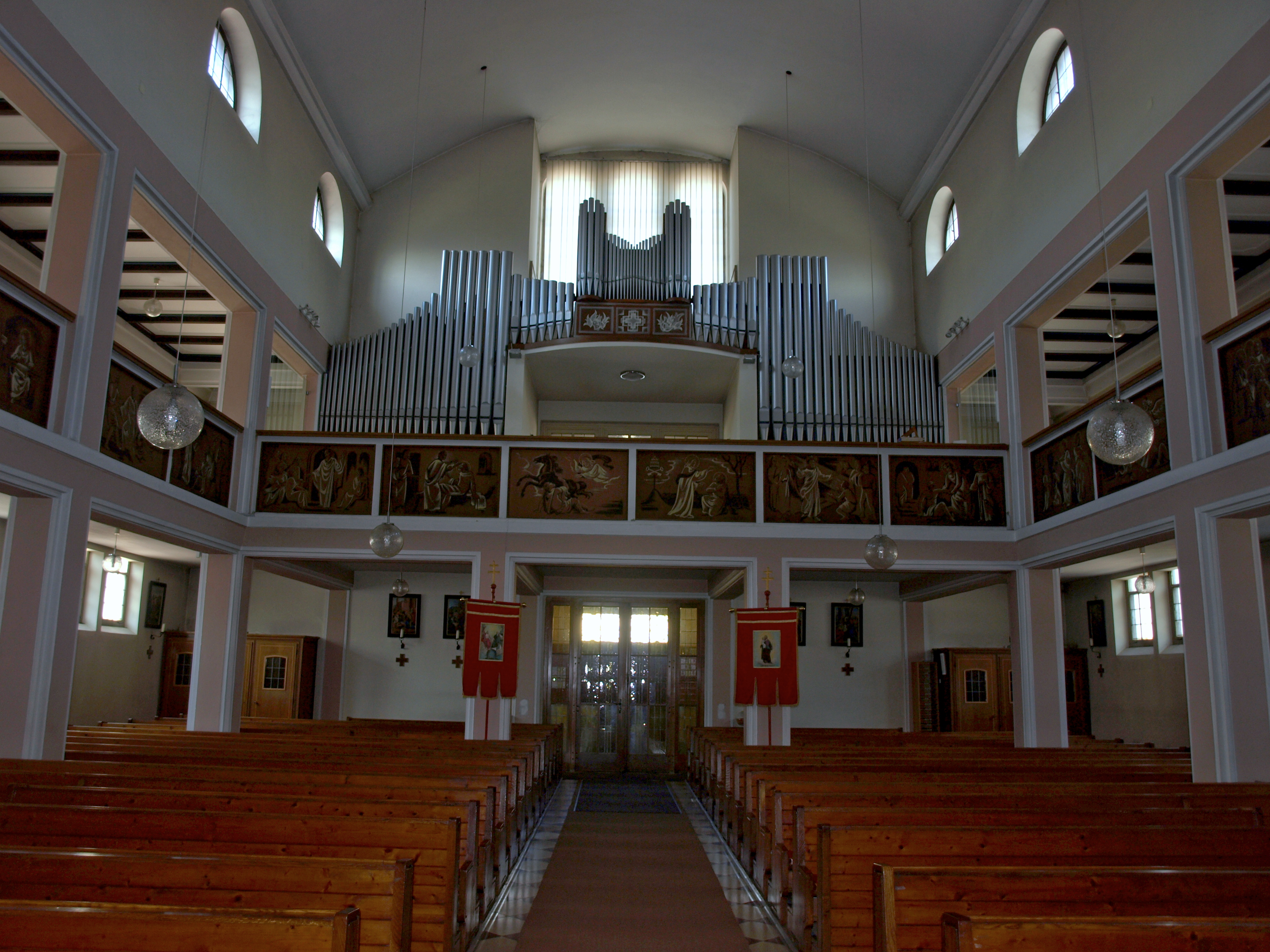 Kath. Pfarrkirche hll. Petrus und Paulus